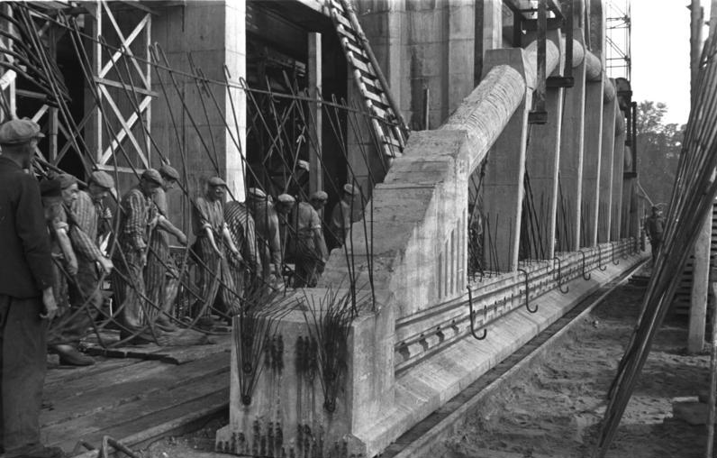 Bremen, U-Bootbunker "Valentin", Bau